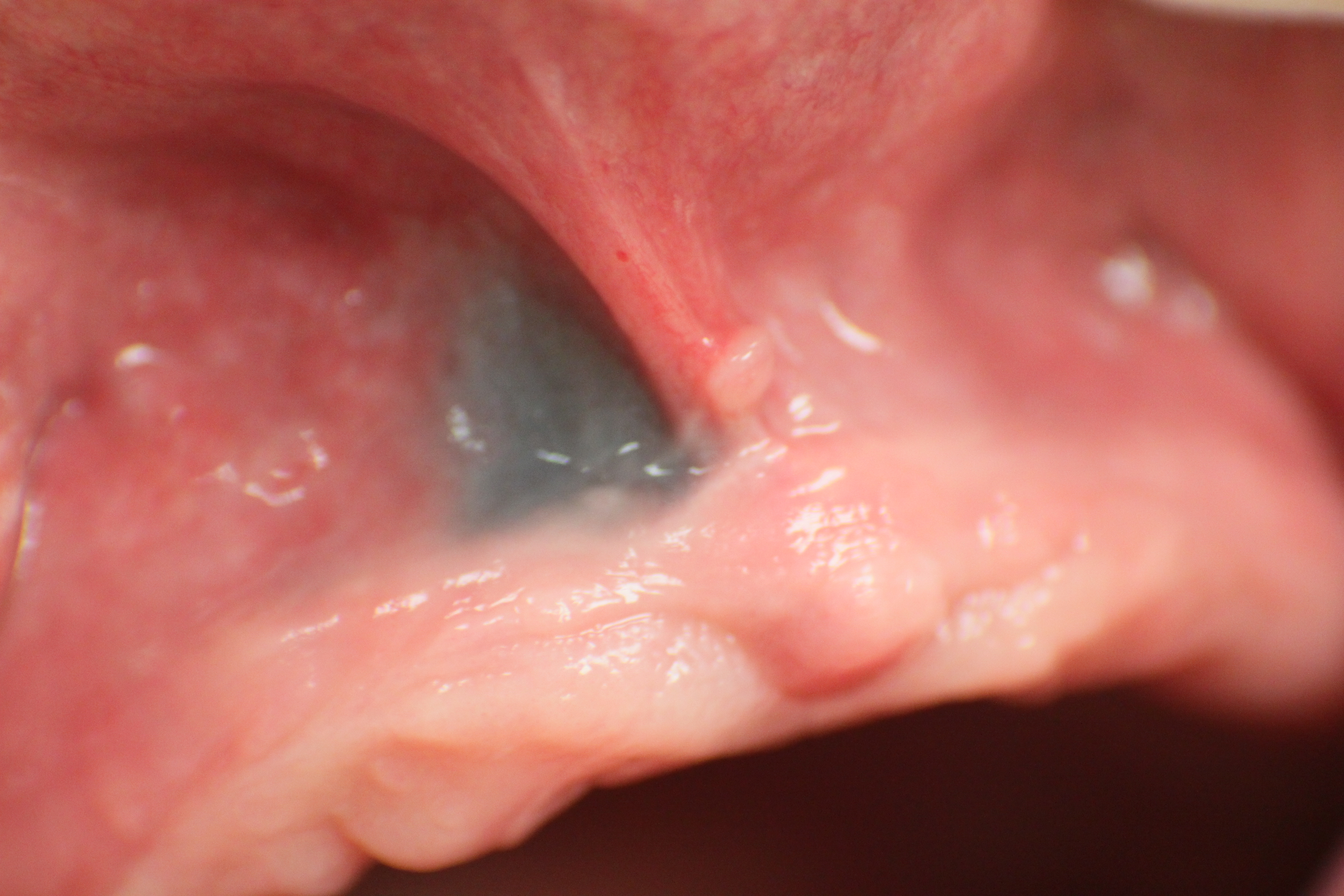 Amalgamtätowierung; zahnloser Oberkiefer; Front; 11